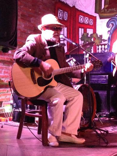 Esta imagen es una versión recortada de la que se encuentra en este link